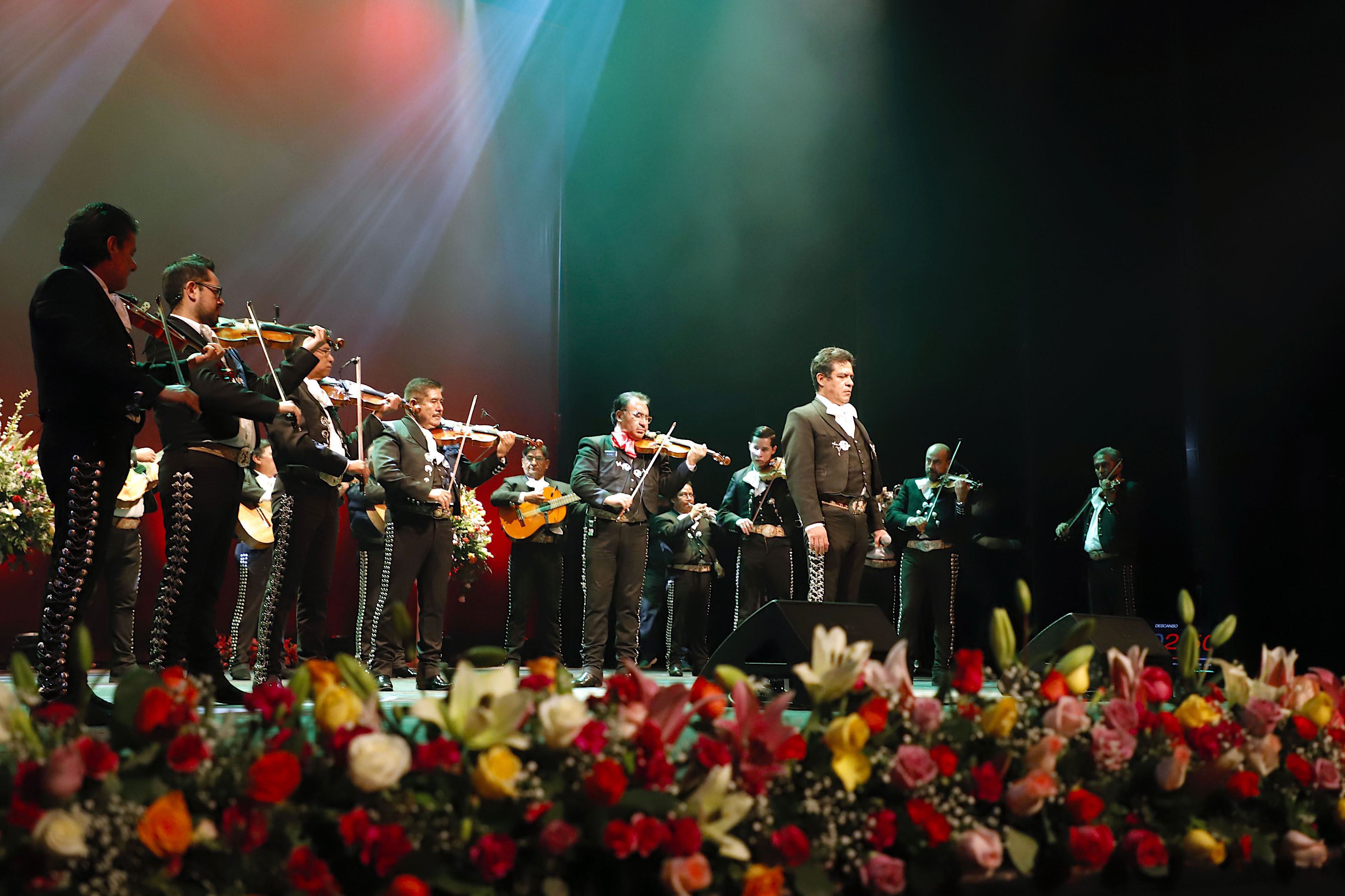 Miércoles 6 de mayo de 2020 En el Teatro de la Ciudad Esperanza Iris, se realizó la grabación de Cantemos con Mamá desde Casa, con la participación decenas de mariachis, quienes interpretaron melodías de su repertorio vernáculo. Entre las agrupaciones musicales se encontraba, Mariachi Garibaldi, Julio Ponce acompañado del Mariachi Estampas de México, así como Amanecer Jalisciense. Fotografía: Milton Martínez/ Secretaría de Cultura de la Ciudad de México